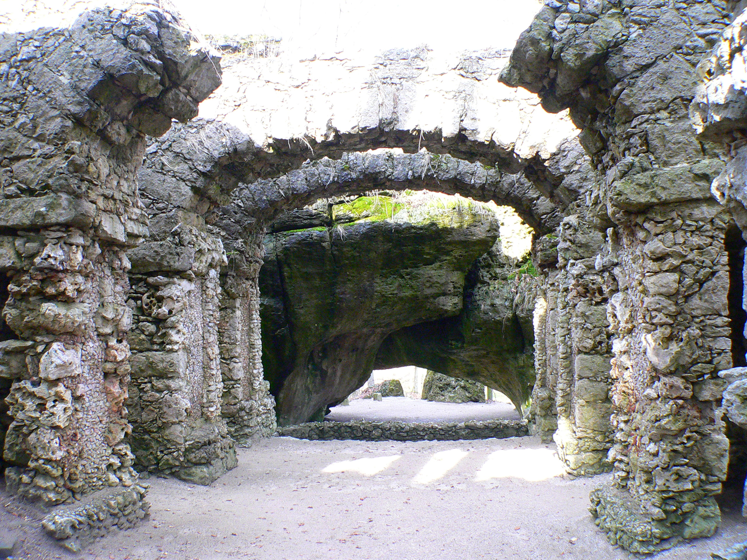 Felsengarten Sanspareil, Ruinentheater Ansicht zur Grotte der Calypso - Fränkische Schweiz, Bayern